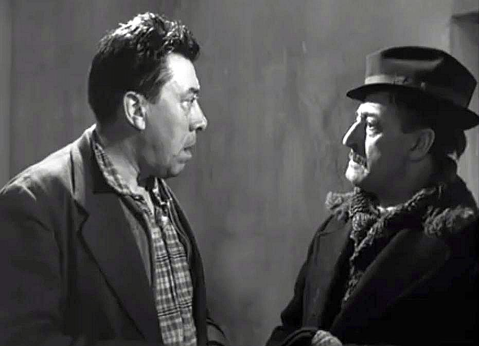 Screenshot del film La legge è legge (1958). I protagonisti della scena sono: Fernandel (a sinistra) e Totò (a destra)